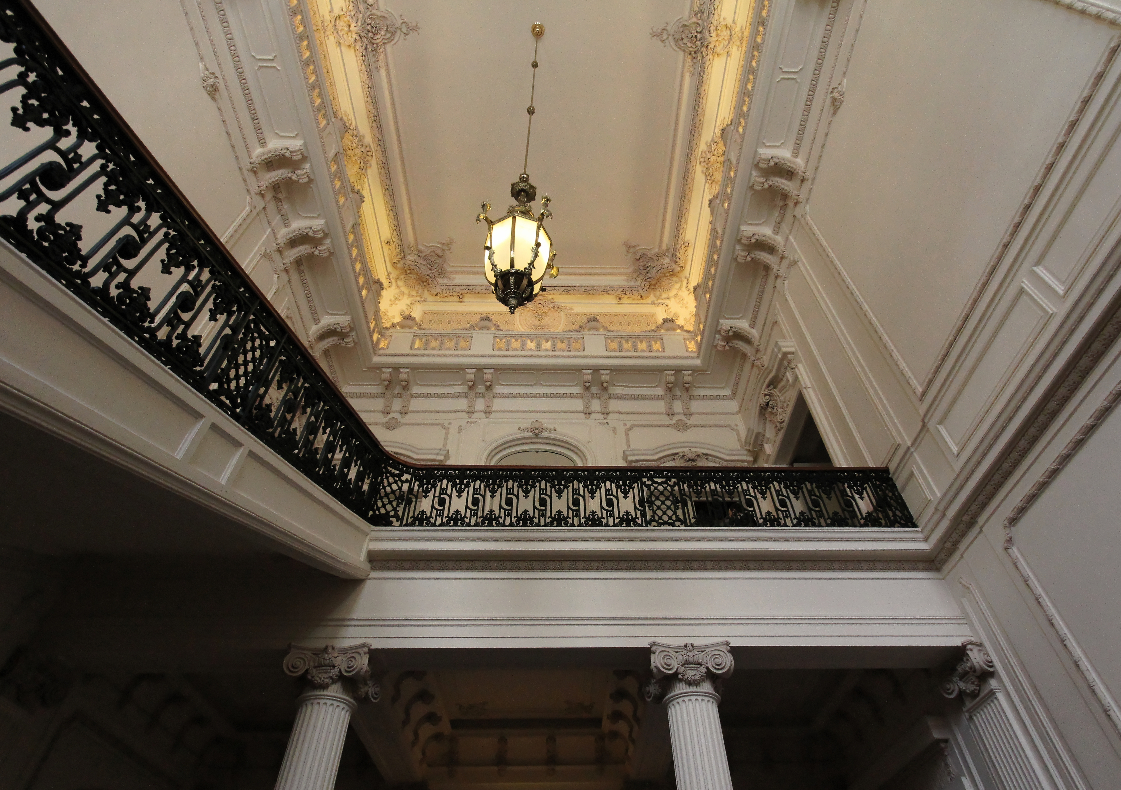 Andrássy Universität Budapest; Treppenhaus